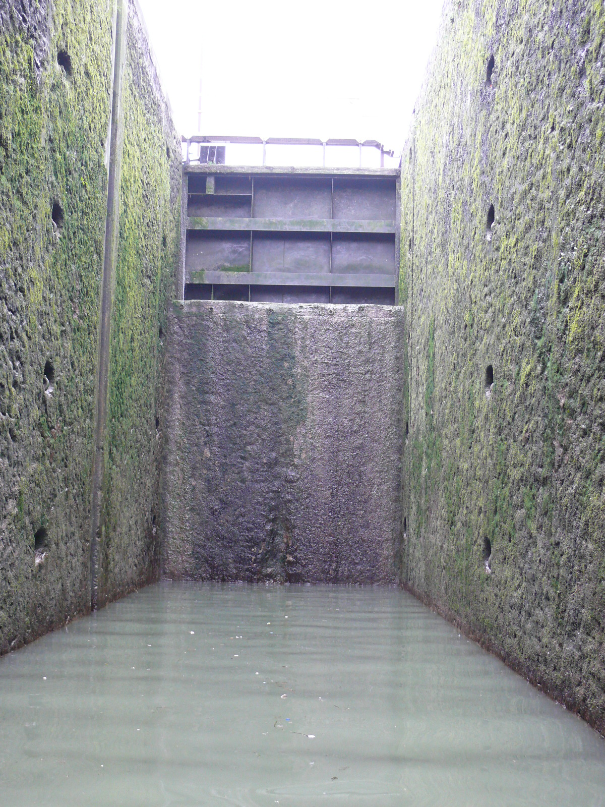 L'écluse du Pont de Flandre (1ère écluse du Canal Saint-Denis à Paris rattrape une dénivellation de 10 m. Ici, vue de l'intérieur du Petit bief.